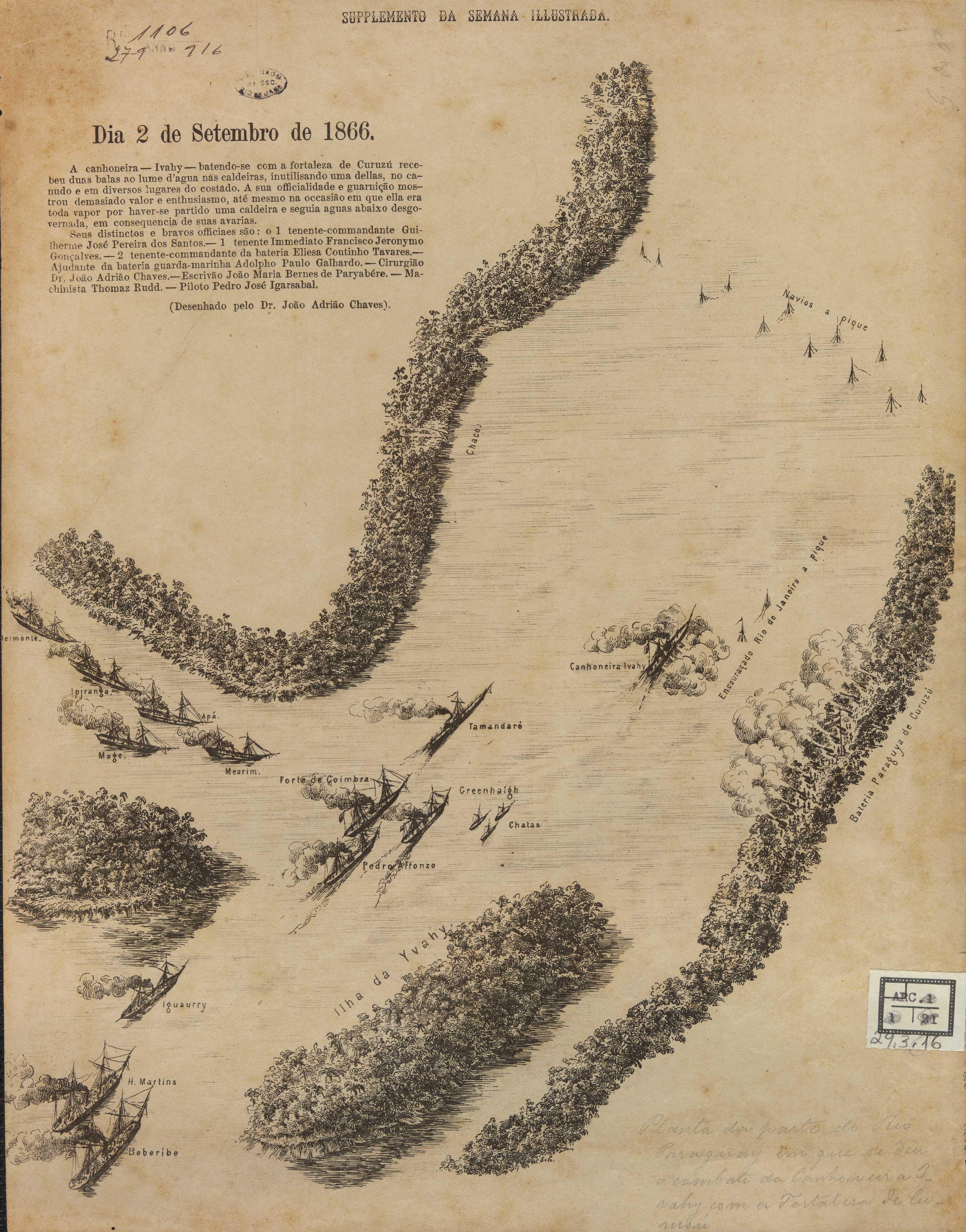 [Planta da parte do rio Paraguai em que se deu combate da canhoneira Ivaí com a Fortaleza de Curuzu] [Cartográfico]